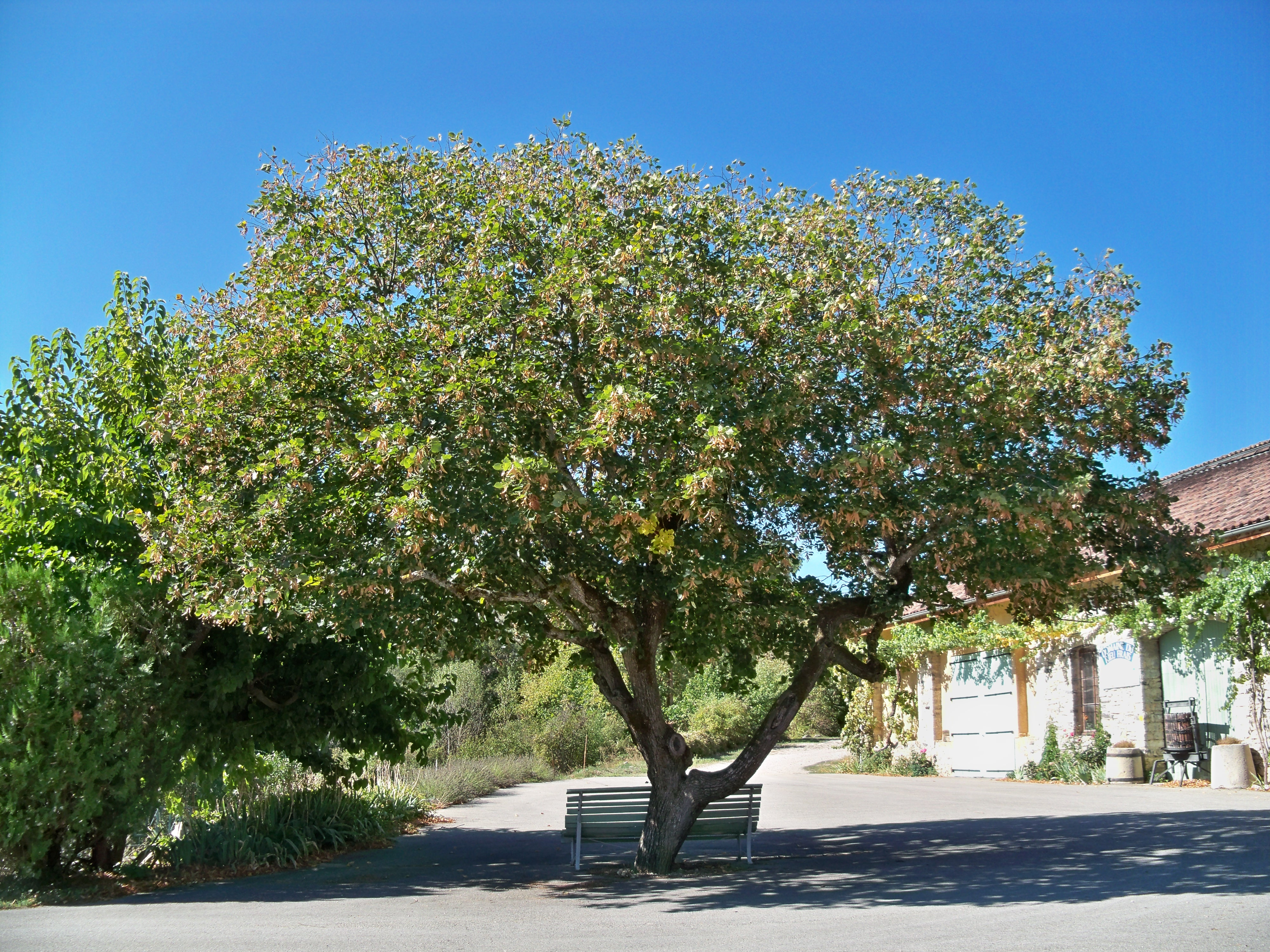 Tilleul à Sainte Jalle